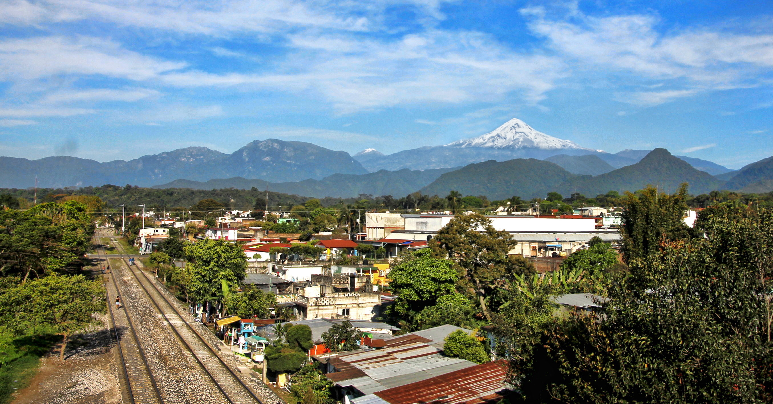 Pico de Orizaba visto de Fortin de las Flores